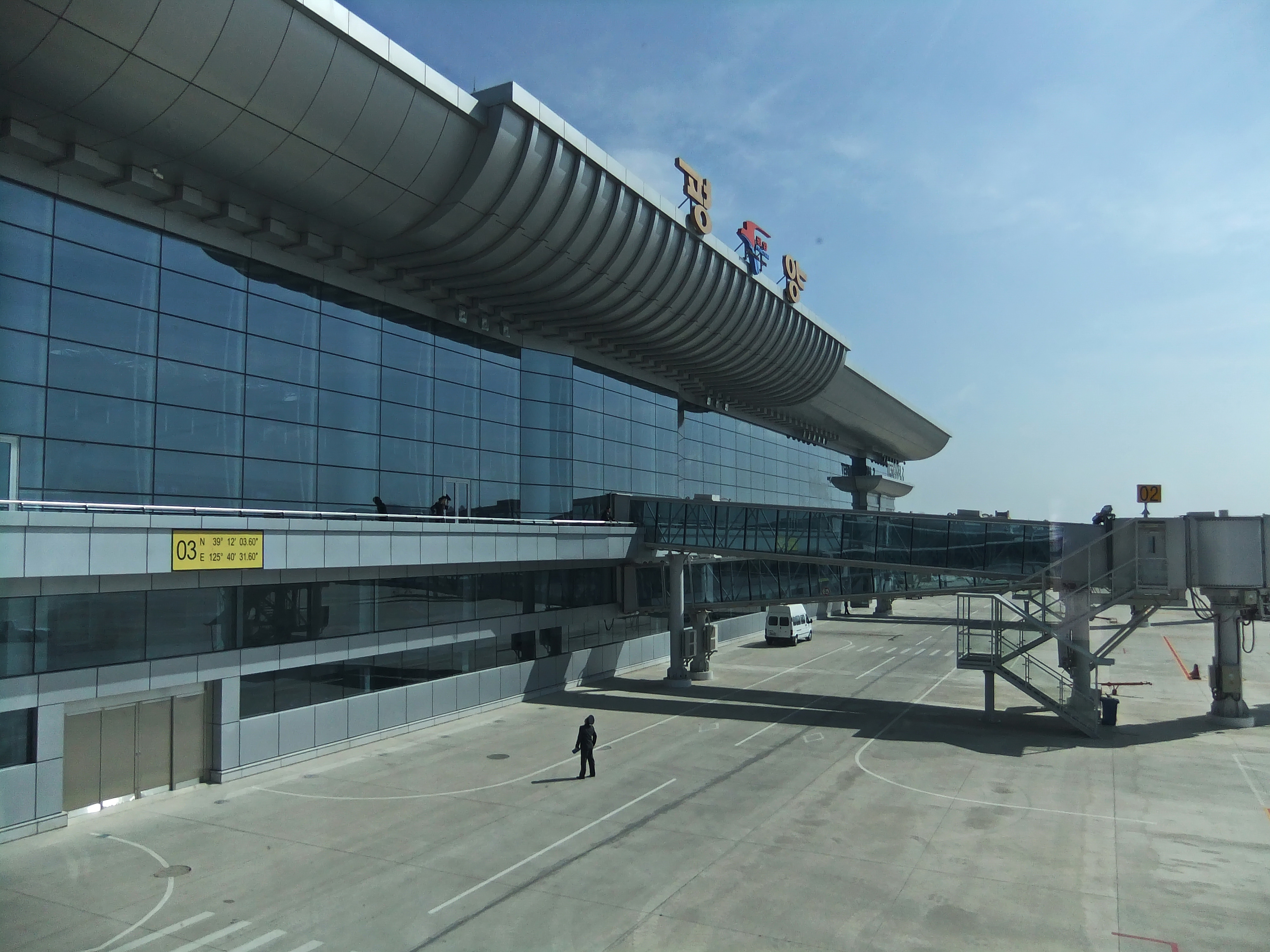 Nordkorea 2015 - Flughafen Sunan, DPRK